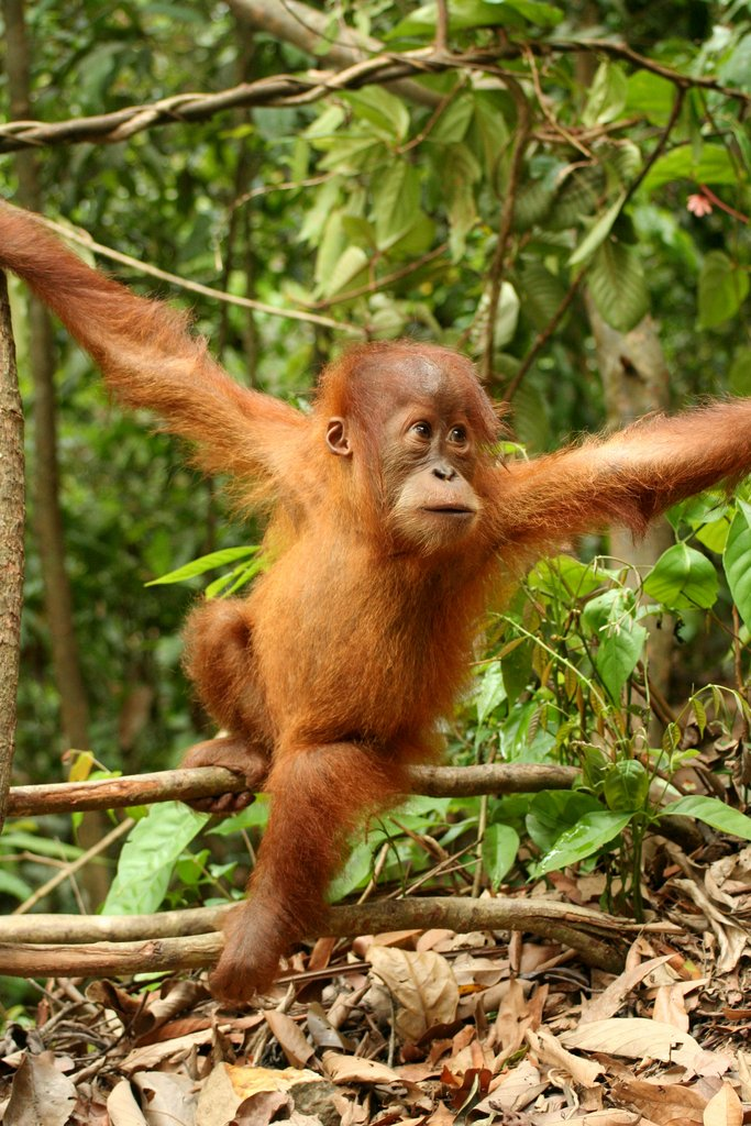 Young Orang-Utan In Bukit Lawang, Gunung Leuser National Parc, Nord Sumatra